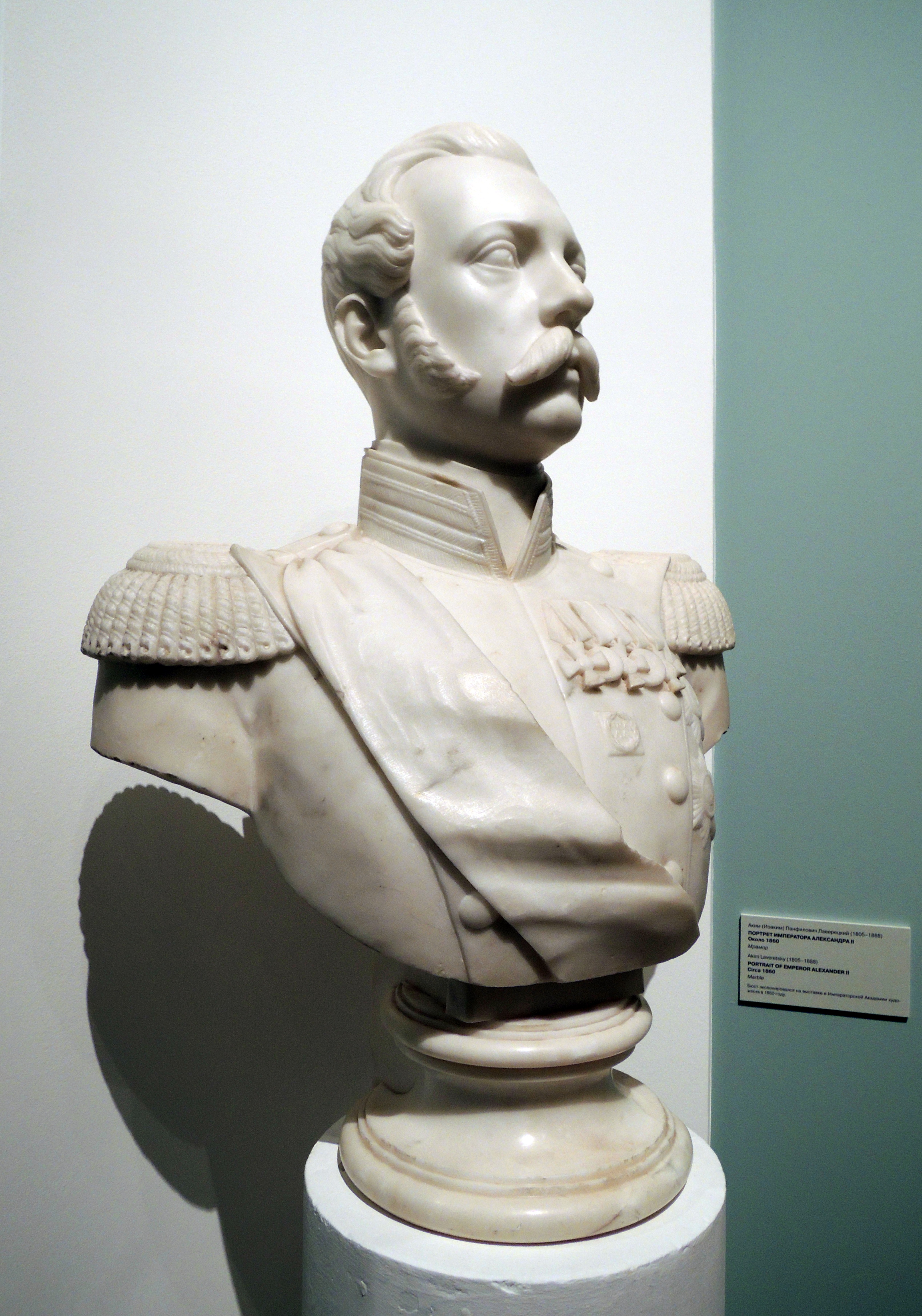 Аким (Иоаким) Панфилович Лаверецкий (1805-1888). Портрет императора Александра II. Около 1860. Мрамор. ГИМ.